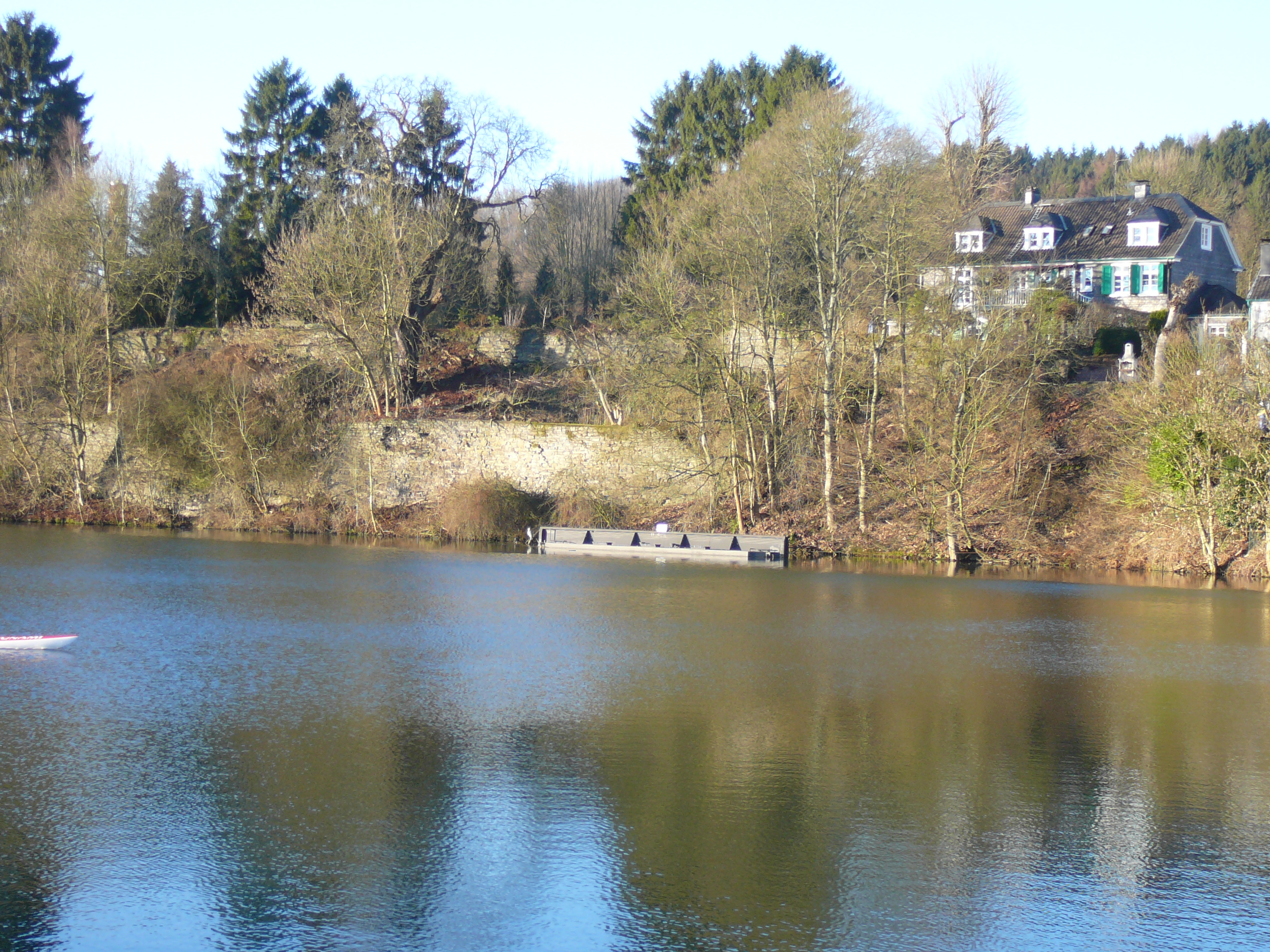 Schemmstraße, Ennepetal